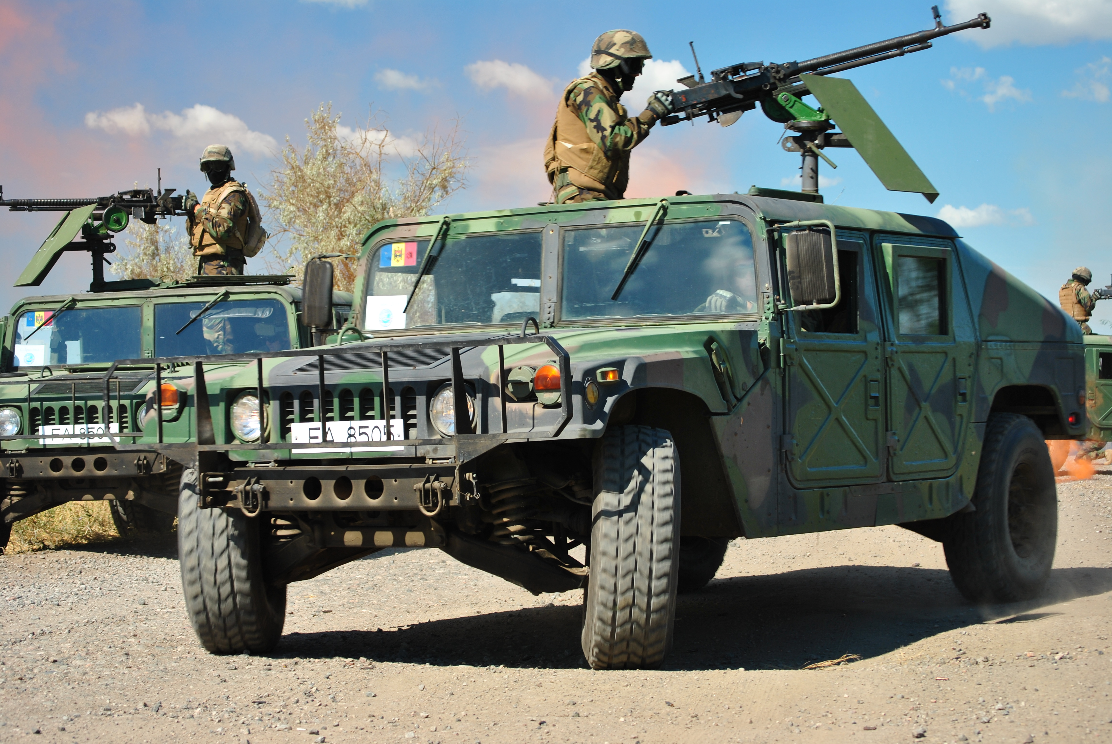 Фото: Дмитрий Удовицкий